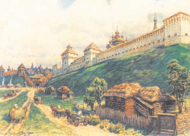 Серпухов